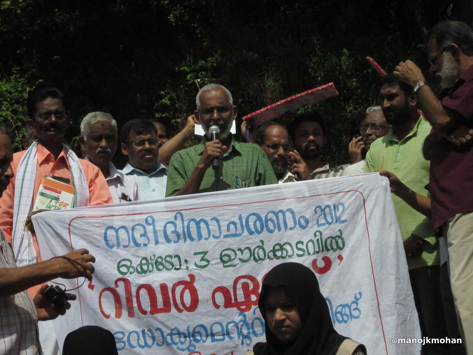 നദീ ദിനാചരണം 2012 ഒക്ടോബര്‍ 3. ചാലിയാര്‍പ്പുഴയുടെ തീരത്തെ മാവൂരിനടുത്ത് കവണക്കല്ല് എന്ന ഗ്രാമത്തില്‍. നാളത്തെ ഒഴുകുന്ന പുഴയ്ക്കുവേണ്ടി വിദ്യാര്‍ഥികളടക്കുമുള്ള നൂറുകണക്കിന് പരിസ്ഥിതി പ്രവര്‍കര്‍ നദീ ദിനപ്രതിജ്ഞയടക്കമുള്ള വിവിധപരിപാടികളില്‍ പങ്കെടുത്തു.